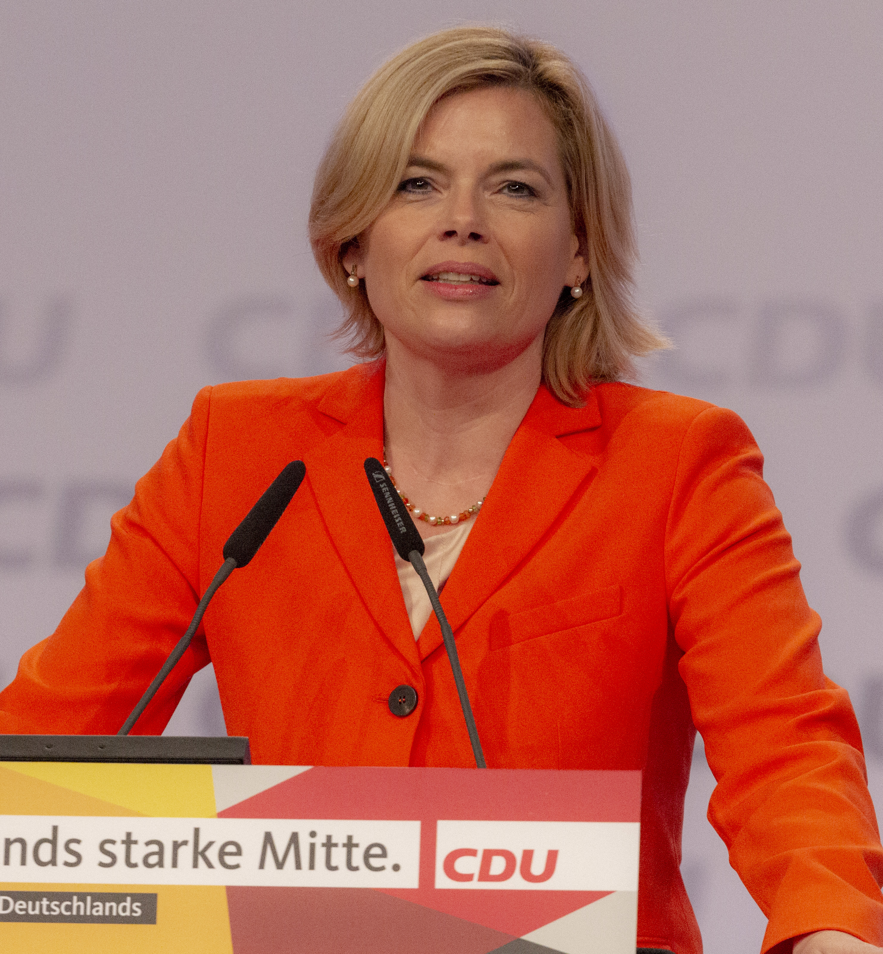 Julia Klöckner auf dem CDU Parteitag 2019 am 22. November 2019 in Leipzig.